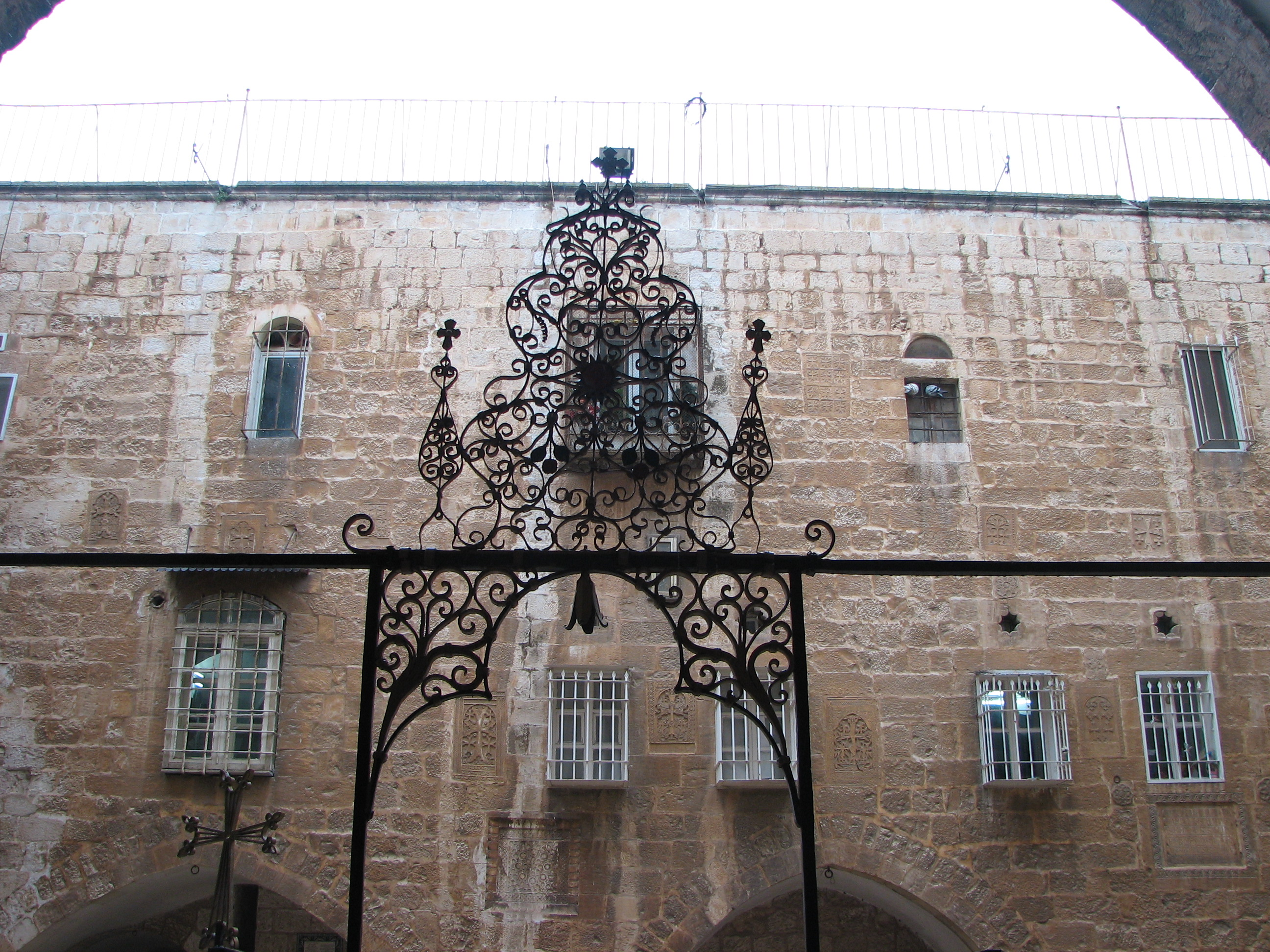 Monastery of St. James, Jerusalem - the Armenian Quarter מנזר סט. ג'יימס הרובע הארמני בירושלים